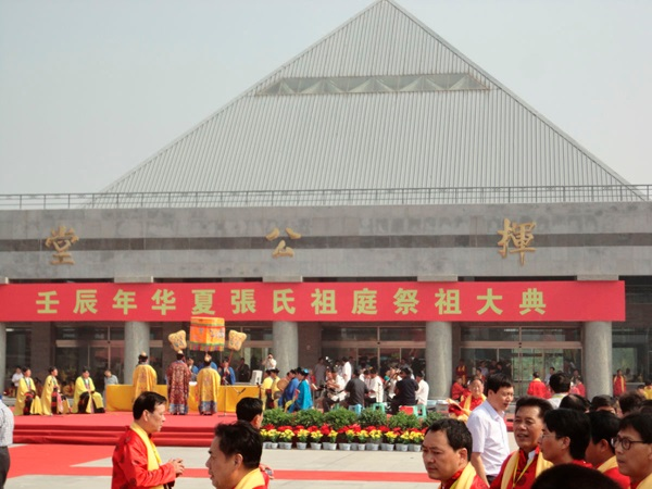 张挥公大殿-河北省清河县-道教仪式-张氏祖庭祭祖